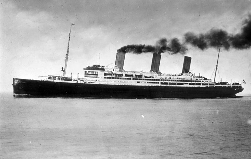 Dampfer "Vaterland" Passagierschiff "Vaterland" der Reederei HAPAG auf See